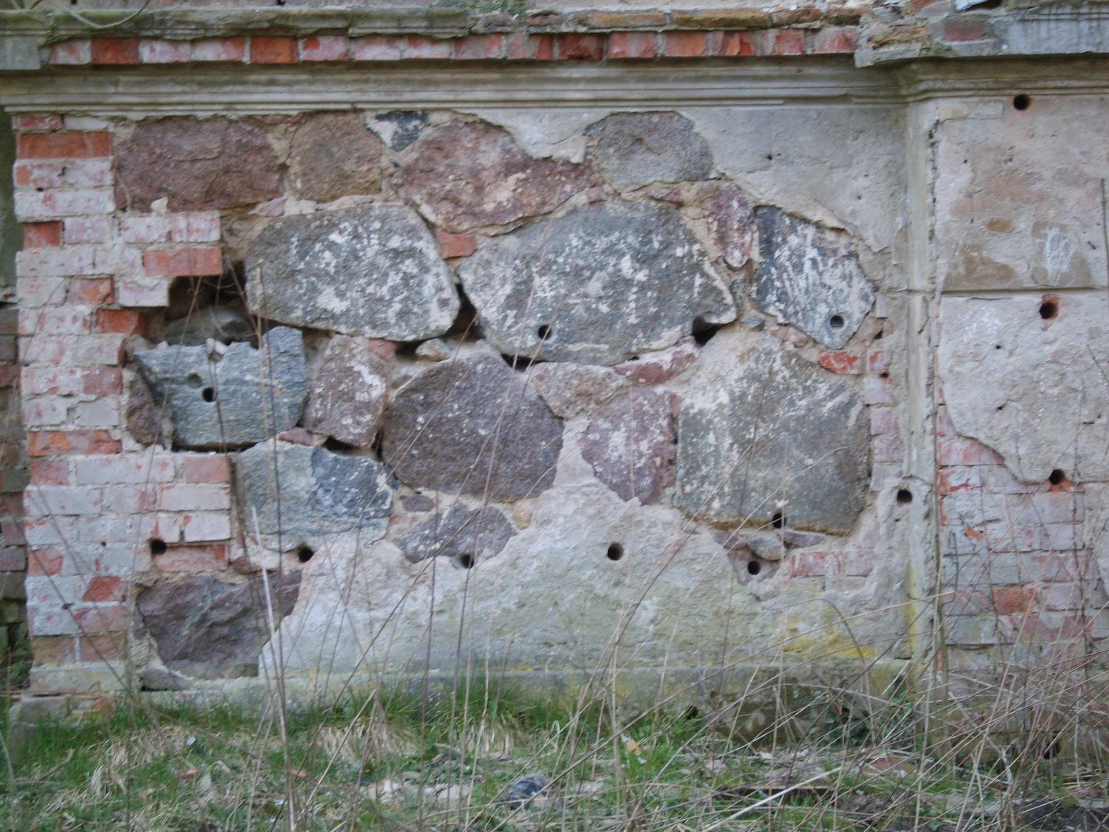 Gutshaus Schmoldow - Sprenglöcher im Fundament